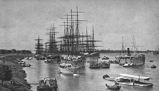 Calcutta